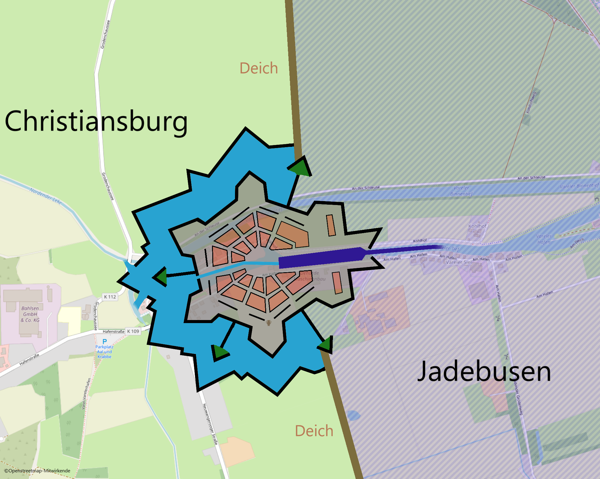 Christiansburg Varel Transparent